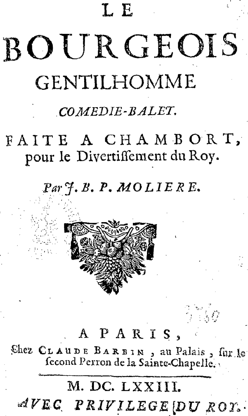 page de couverture de la comédie-ballet "Le Bourgeois Gentilhomme", représentée pour la première fois le 14 octobre 1670, devant la cour de Louis XIV, au château de Chambord par la troupe de Molière. Édition de 1673.